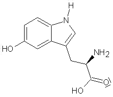 5-Hydroxytryptophan